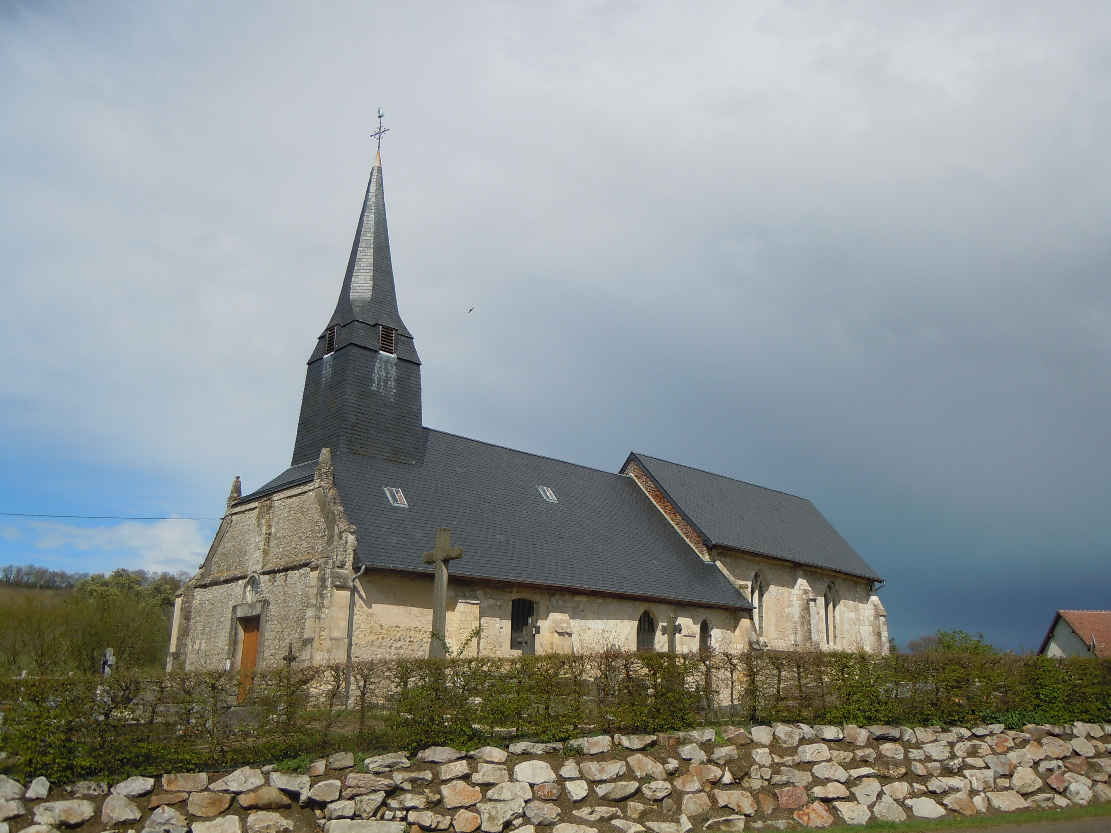 Eglise Saint-Léger d'Angerville - Calvados - France - XIIème siècle